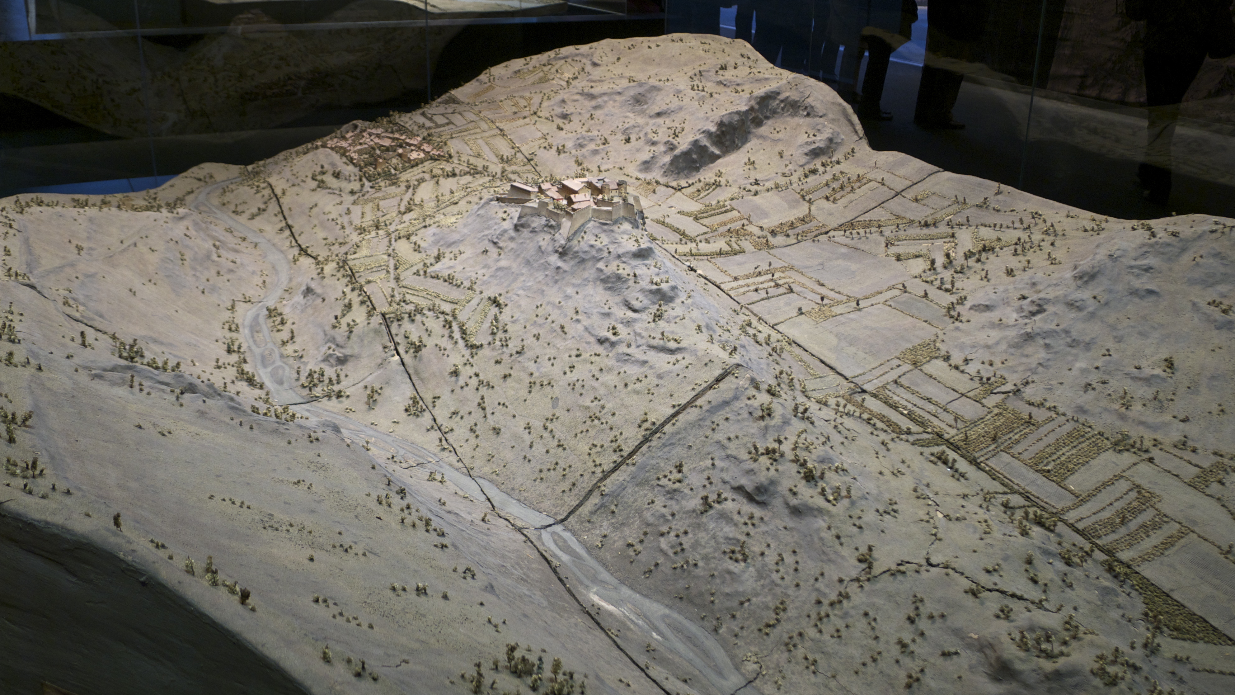 Plan-relief de la ville d'Exilles dans son état de 1695. Plan-relief construit en 1695. Échelle 1/600e